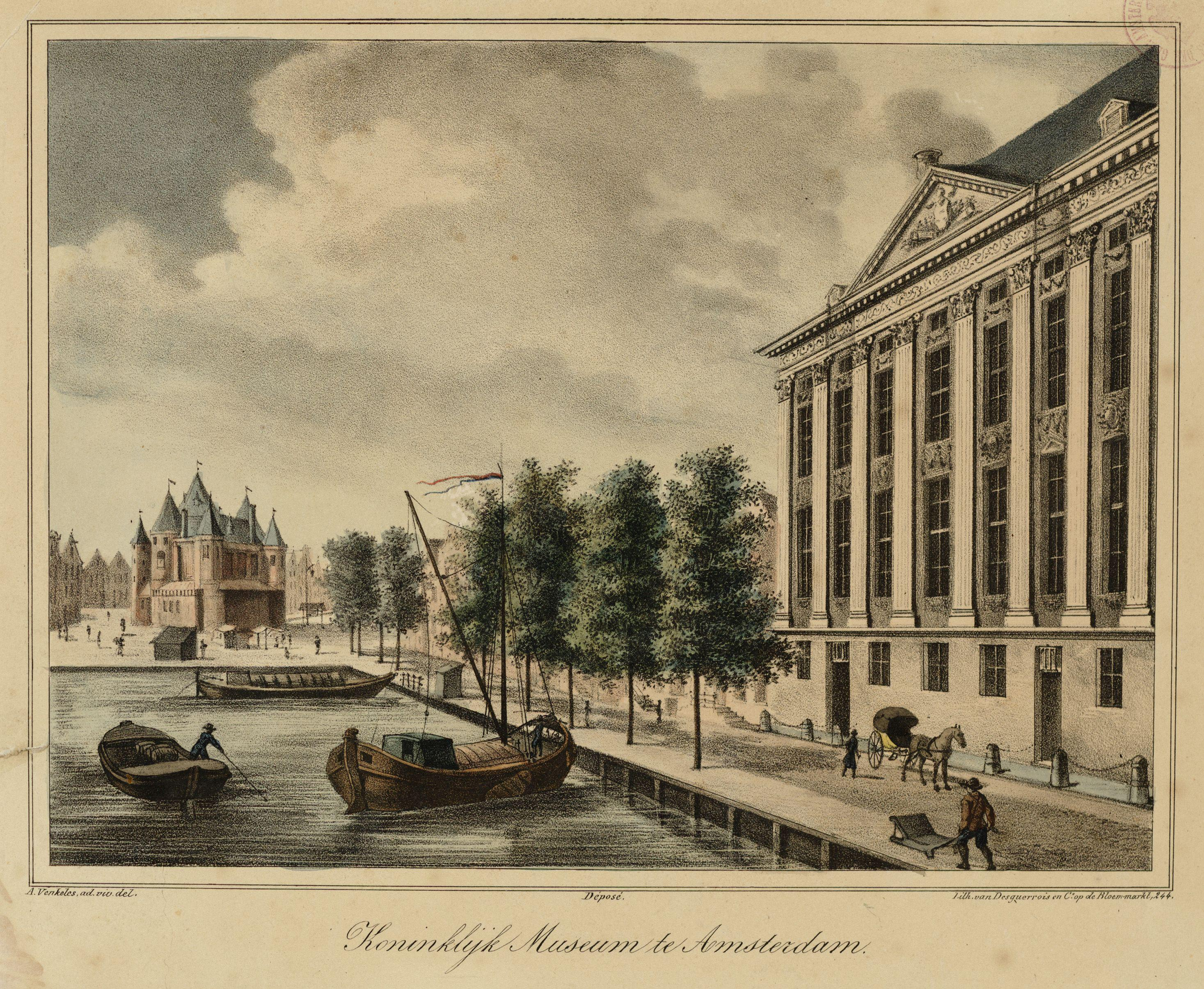 Koninklijk Museum te Amsterdam. Steendruk, handgekleurd. Afmetingen onbekend. Amsterdam, Stadsarchief Amsterdam, collectie tekeningen en prenten.